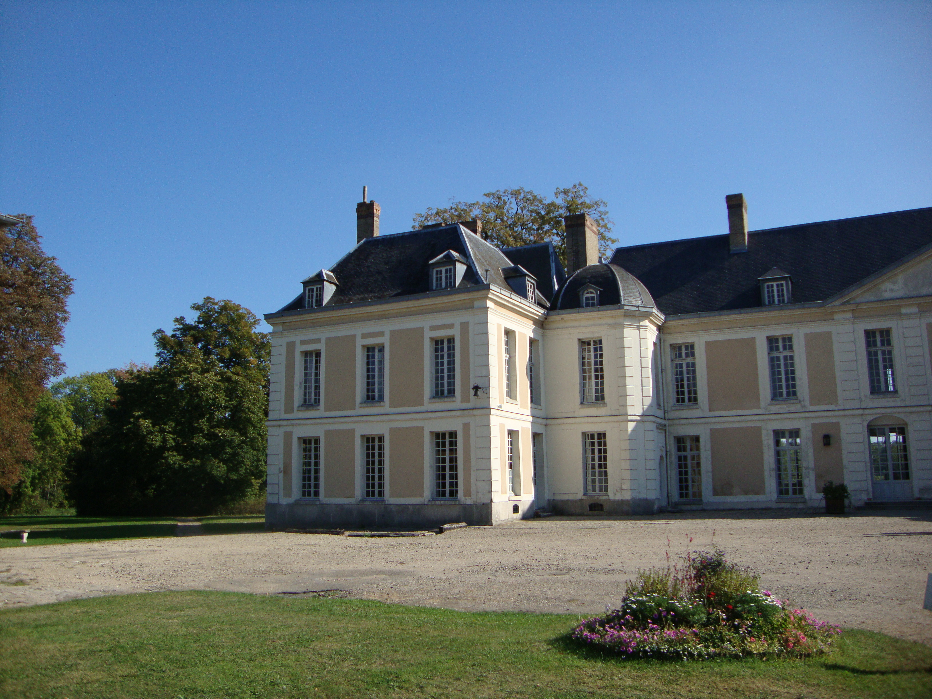 L87 - Château de Brou-sur-Chantereine - Aile gauche - vue de l'arrière .